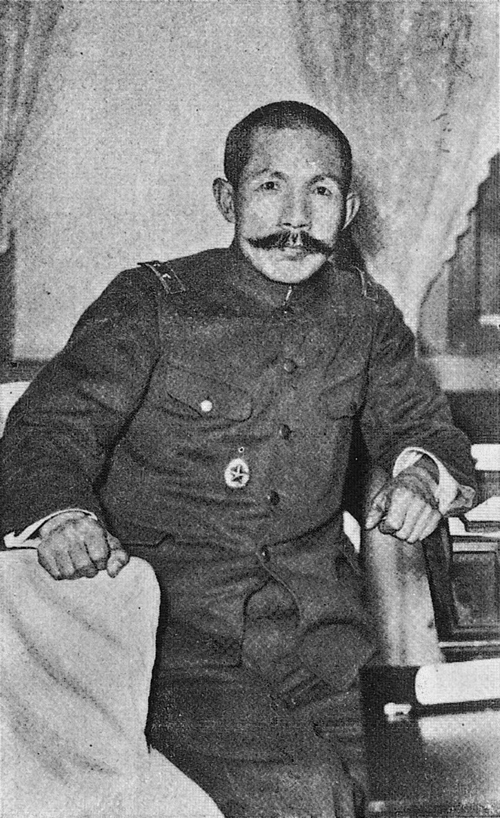 Portrait of Araki Sadao (荒木貞夫, 1877 – 1966)